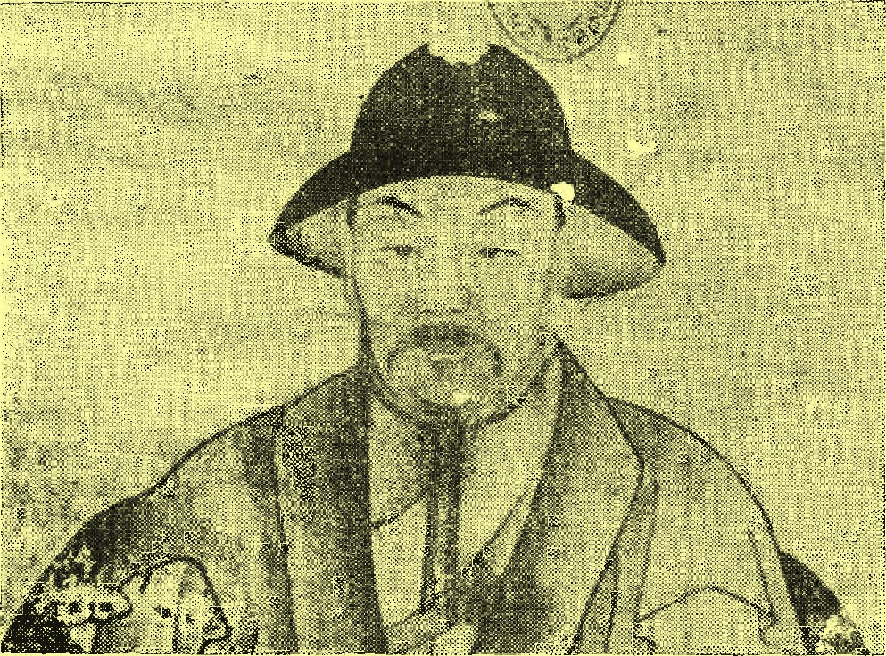 Portrait painting of Chancellor Wang An Shi